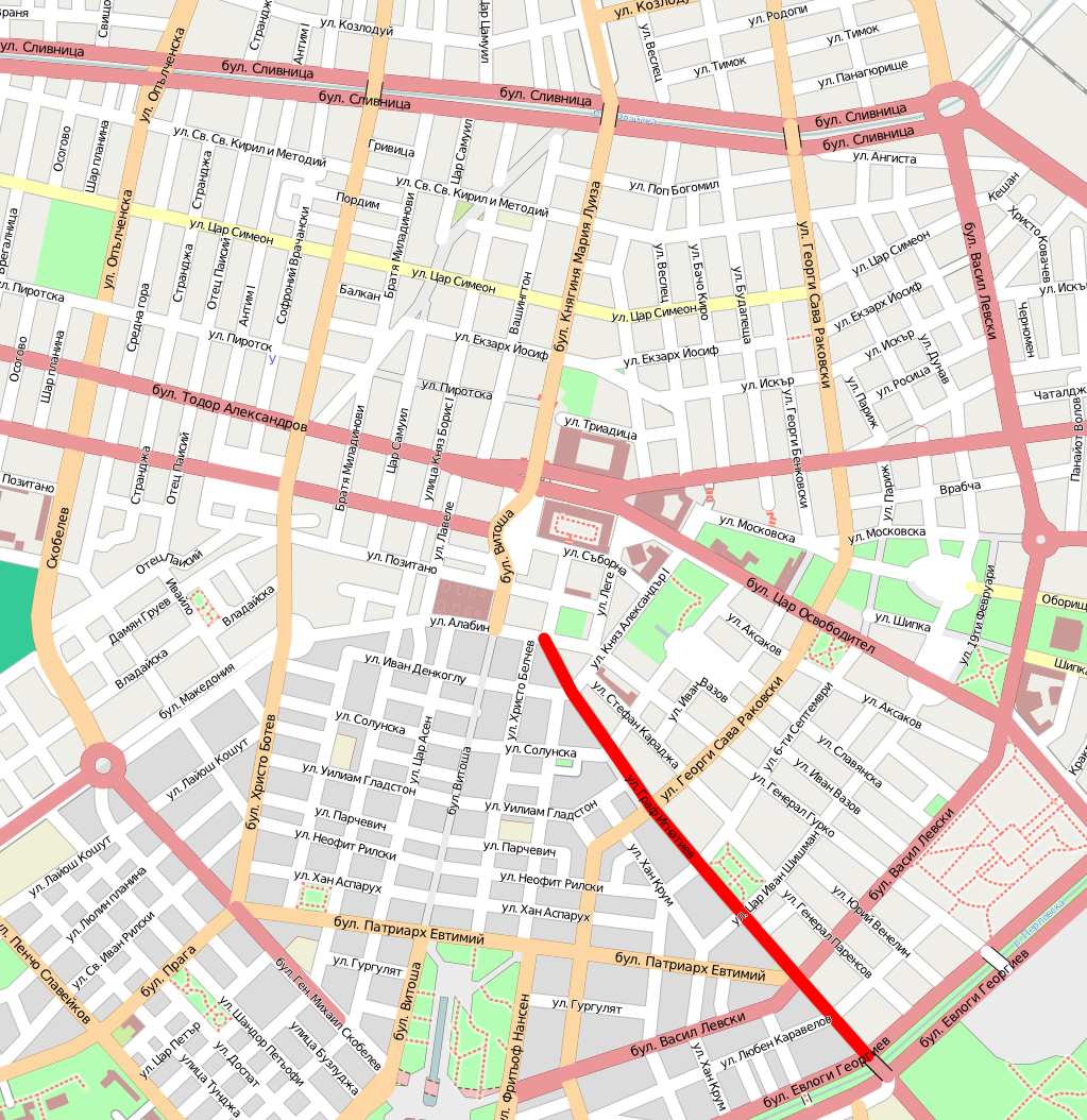 Разположение на улица "Граф Игнатиев" в центъра на София.